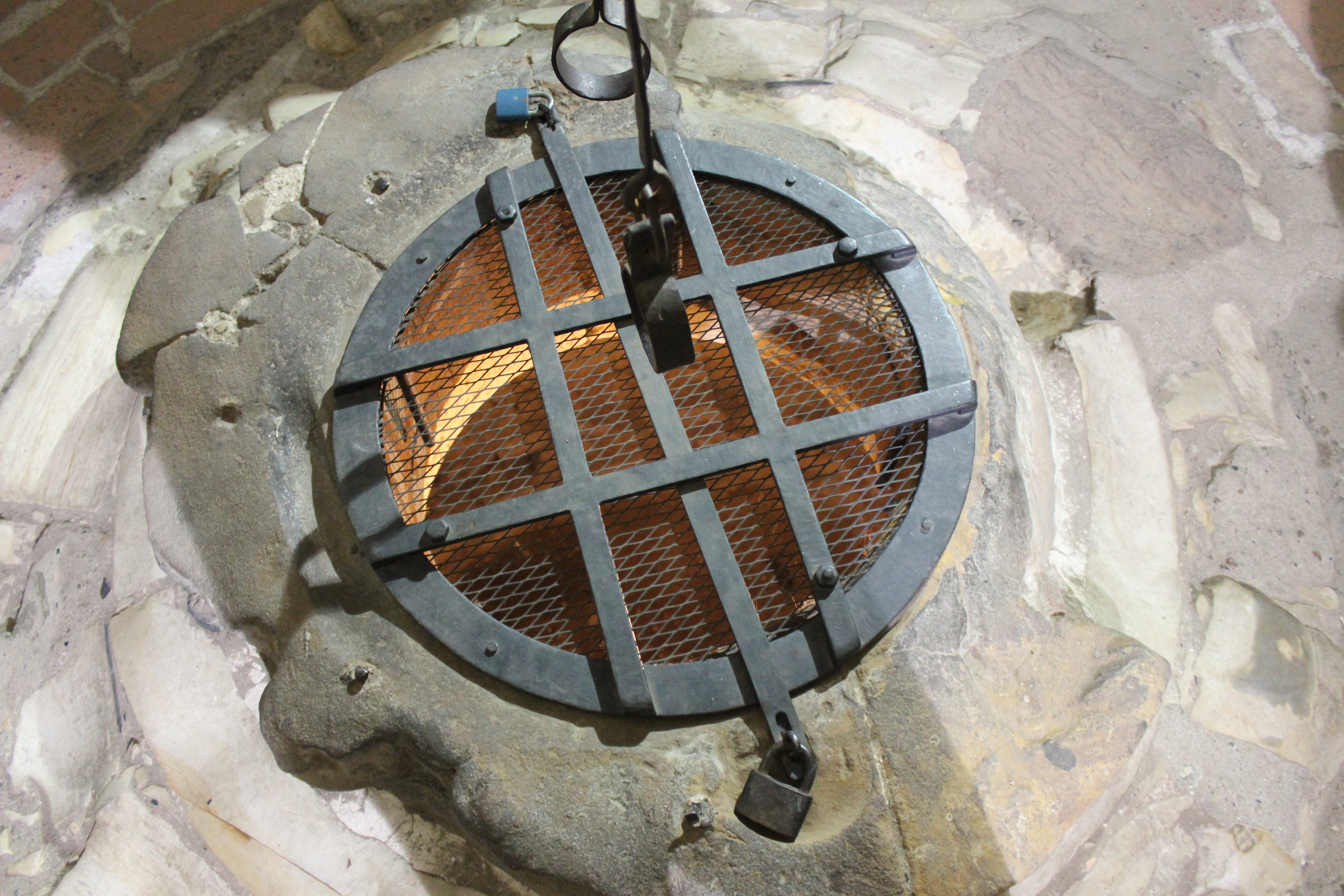 Dalibortårnet Dalibor Tower fangehull prisoner hole